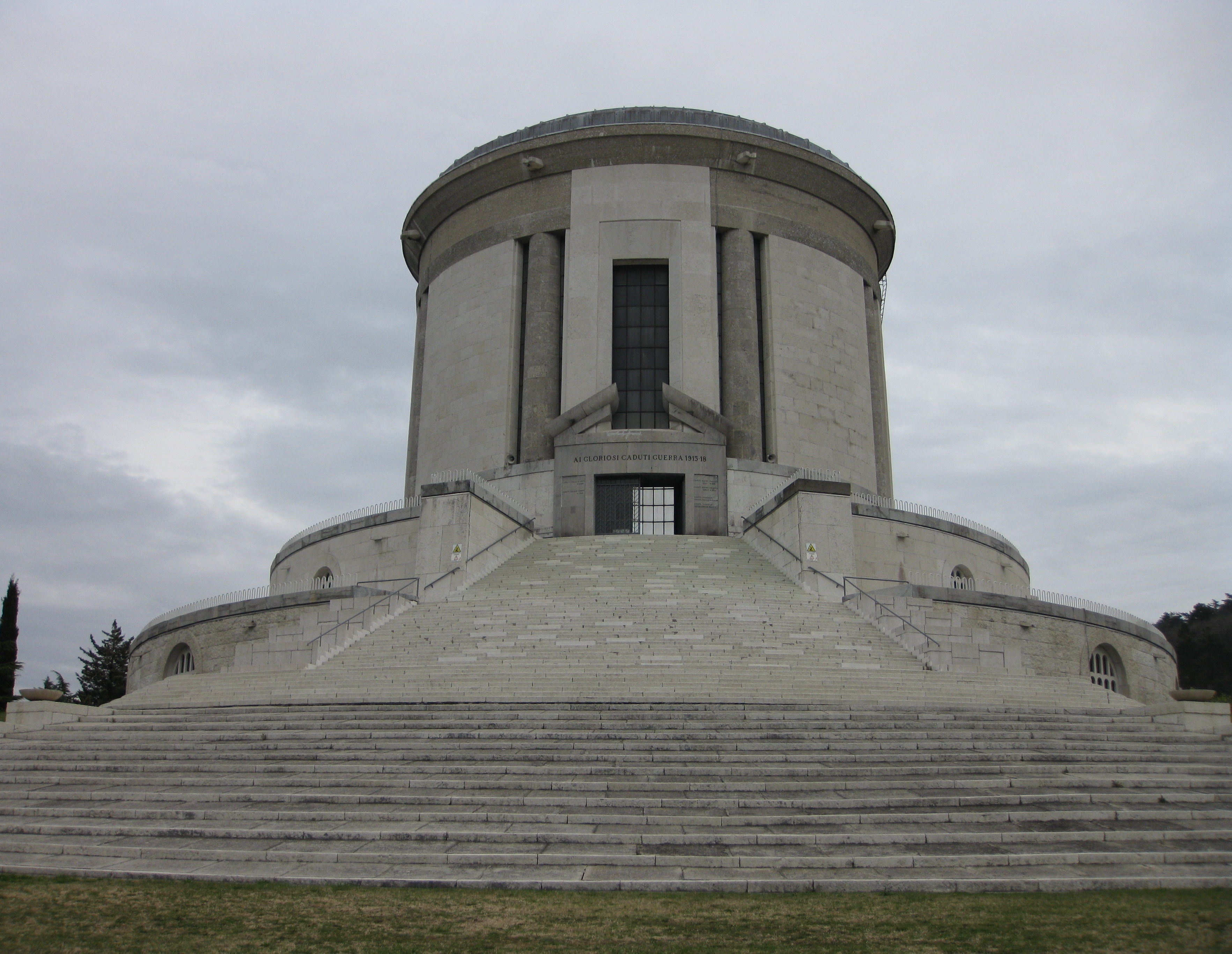 Rovereto - Ossario di Castel Dante